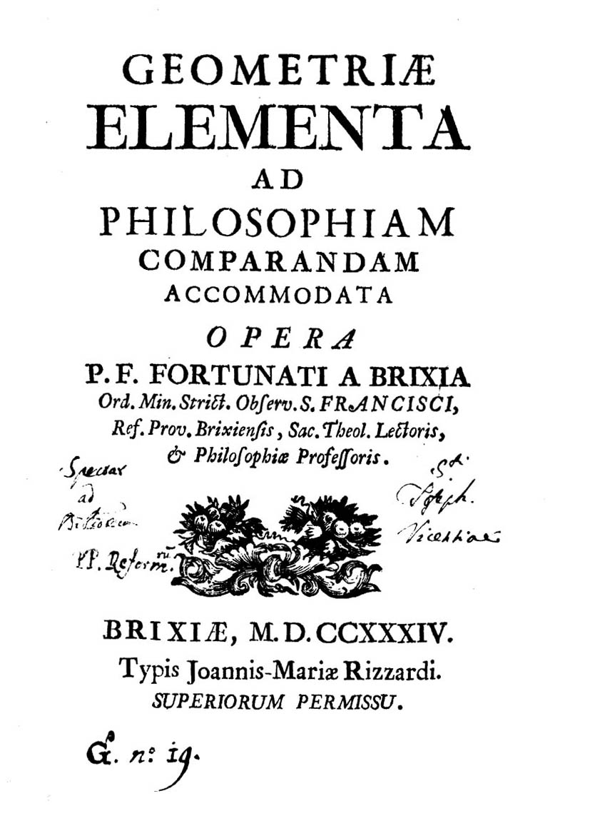 Geometriae elementa ad philosophiam comparandam accommodata opera p.f. Fortunati a Brixia .... - Brixiae : typis Joannis-Mariae Rizzardi, 1734. - XXXII, 144 p., [2] c. di tav. ripiegate : figure geometriche ; 8º .